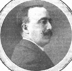 Fotografía del jurista, escritor y político español Gil Roger Vázquez publicada en 1914 con motivo de la aparición de sus novelas Santa y Zaida